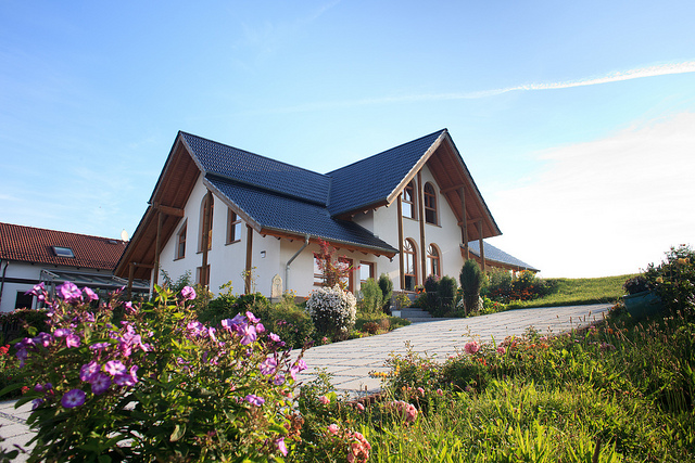 วัดป่าอนาลโย ประเทศเยอรมนี